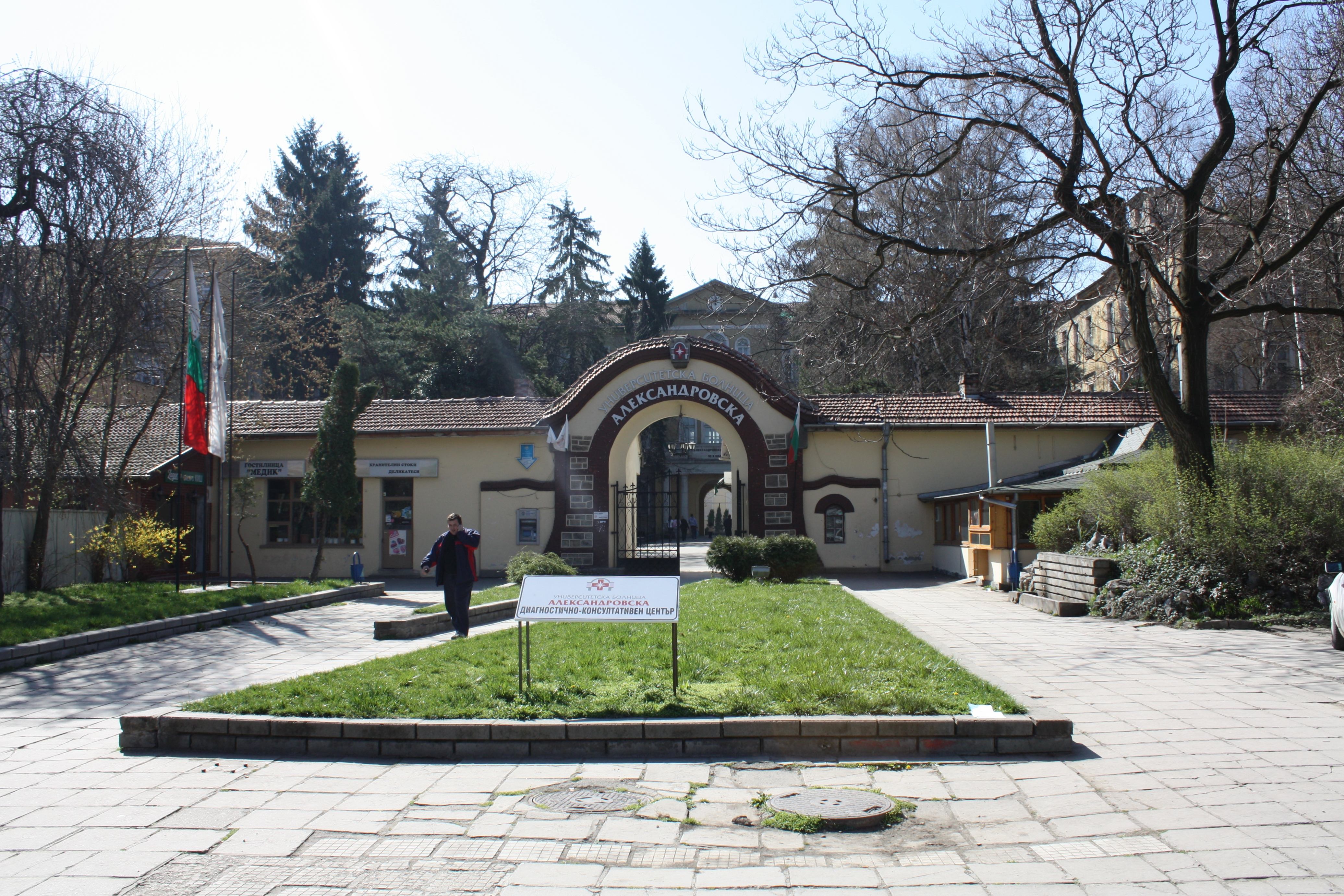 Sofia Medical University, Sofia, Bulgaria, Medizinische Universität Sofia, ehemals: Medizi8nische Akademie Sofia; Медицински университет - София